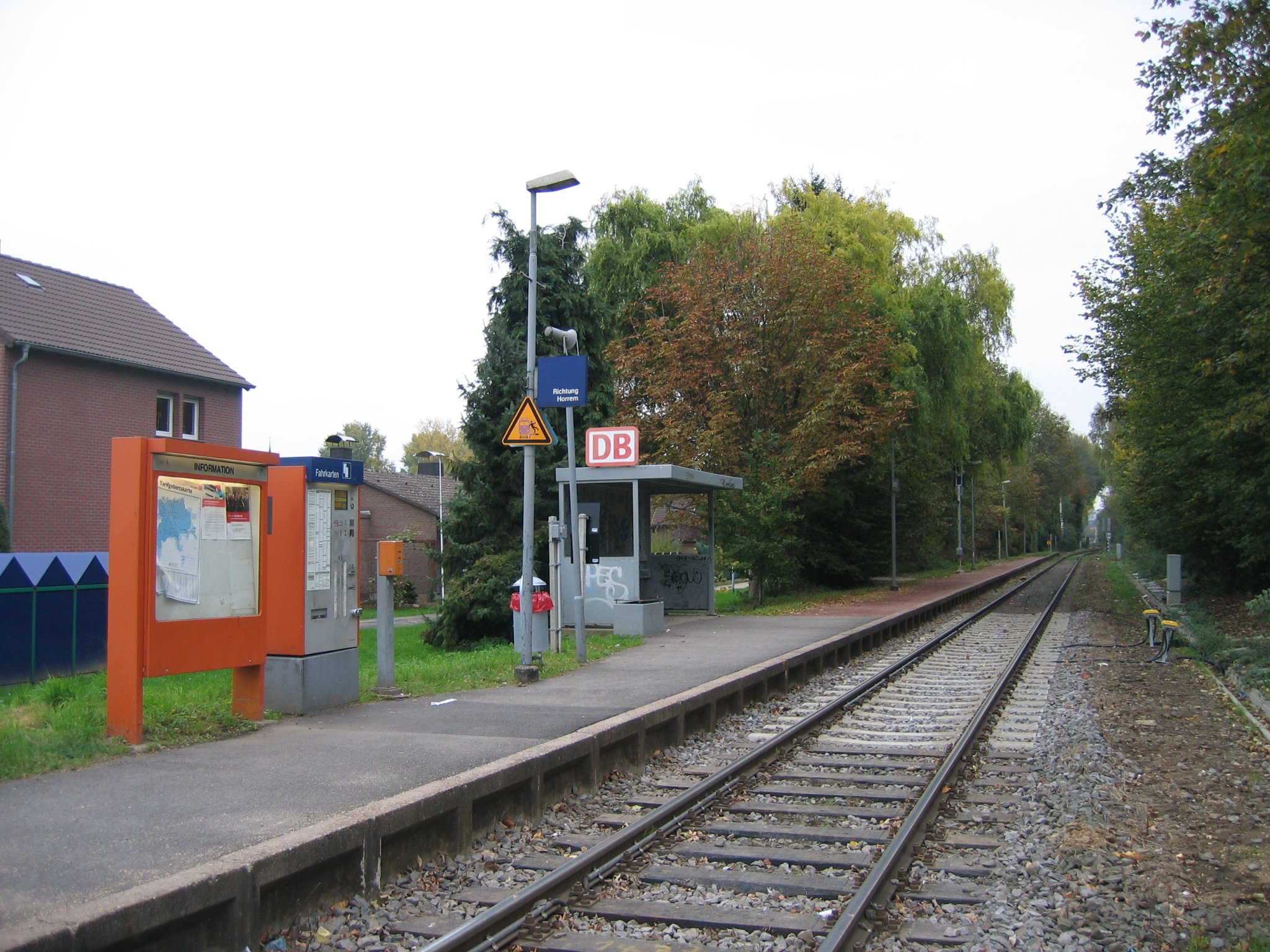 Bahnhof Zieverich an der Erftbahn